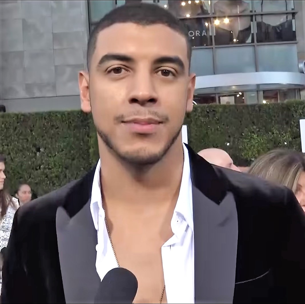 🍭 Mira los gustos de Manuel Medrano y nos cuenta sobre el fuego que lo une a Natalia Jimenez by Dulce Osuna